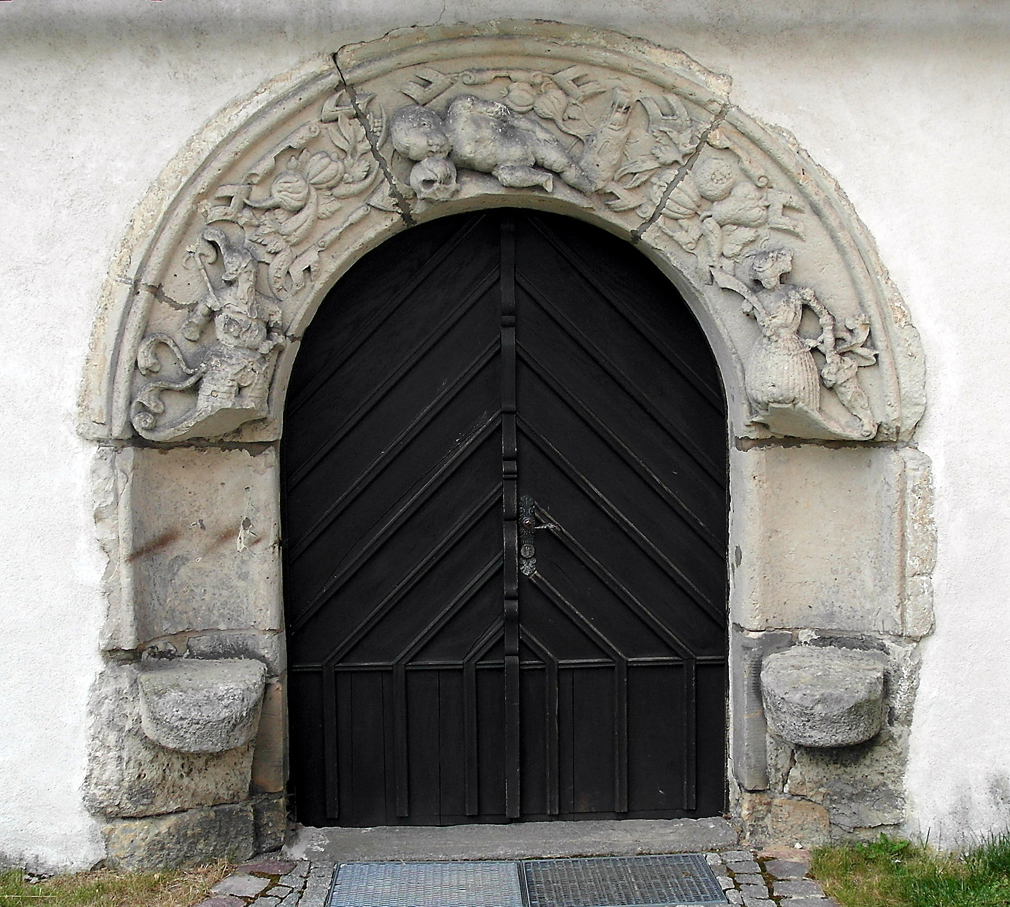 10.06.2015 09618 Langenau (Brand-Erbisdorf): Kirche Langenau mit dem Renaissance-Sitznischenportal vom nach 1945 gesprengten Herrenhaus Niederlangenau. [SAM0905.JPG]20150610551DR.JPG(c)Blobelt